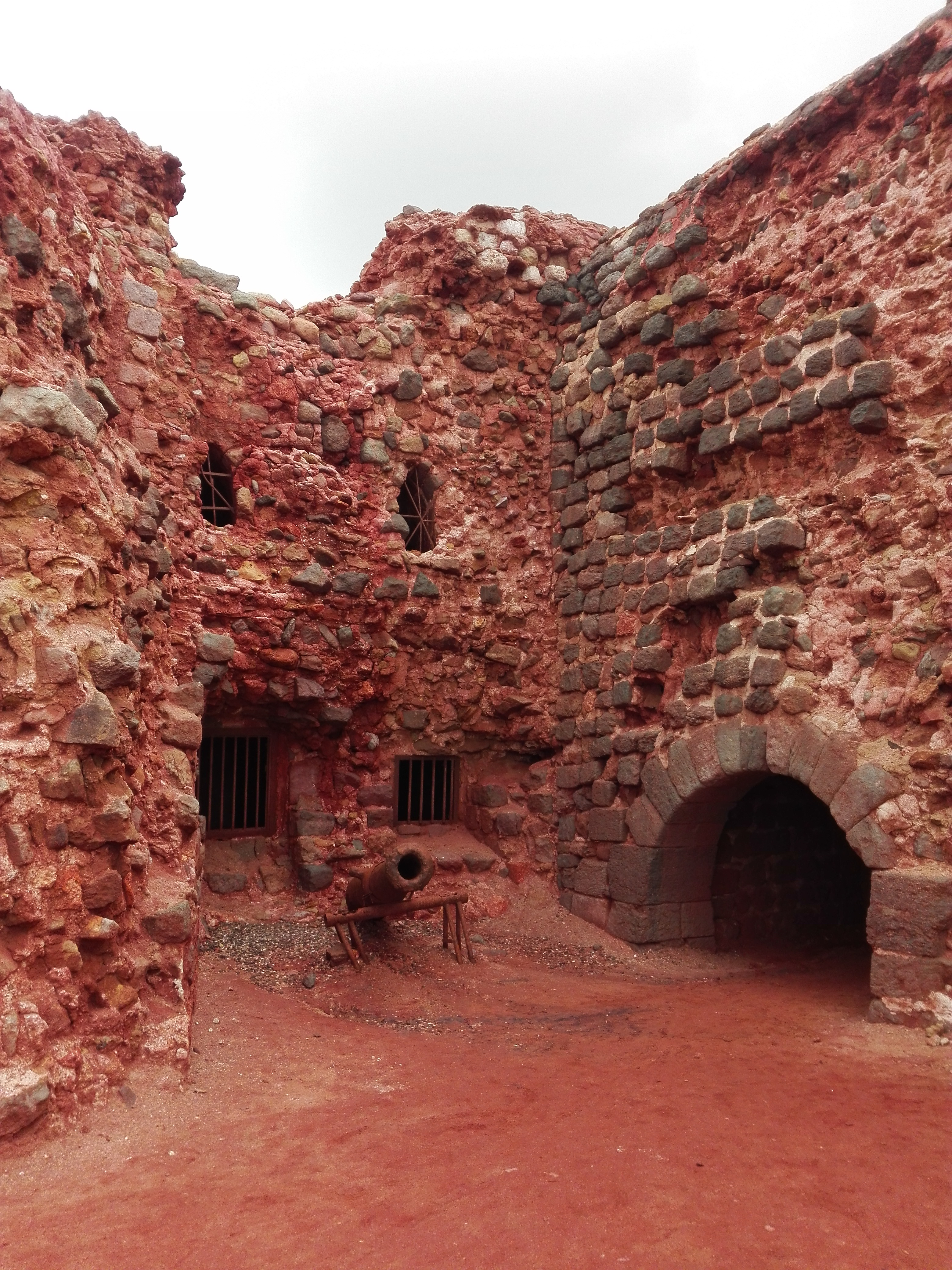 قلعه هرمز